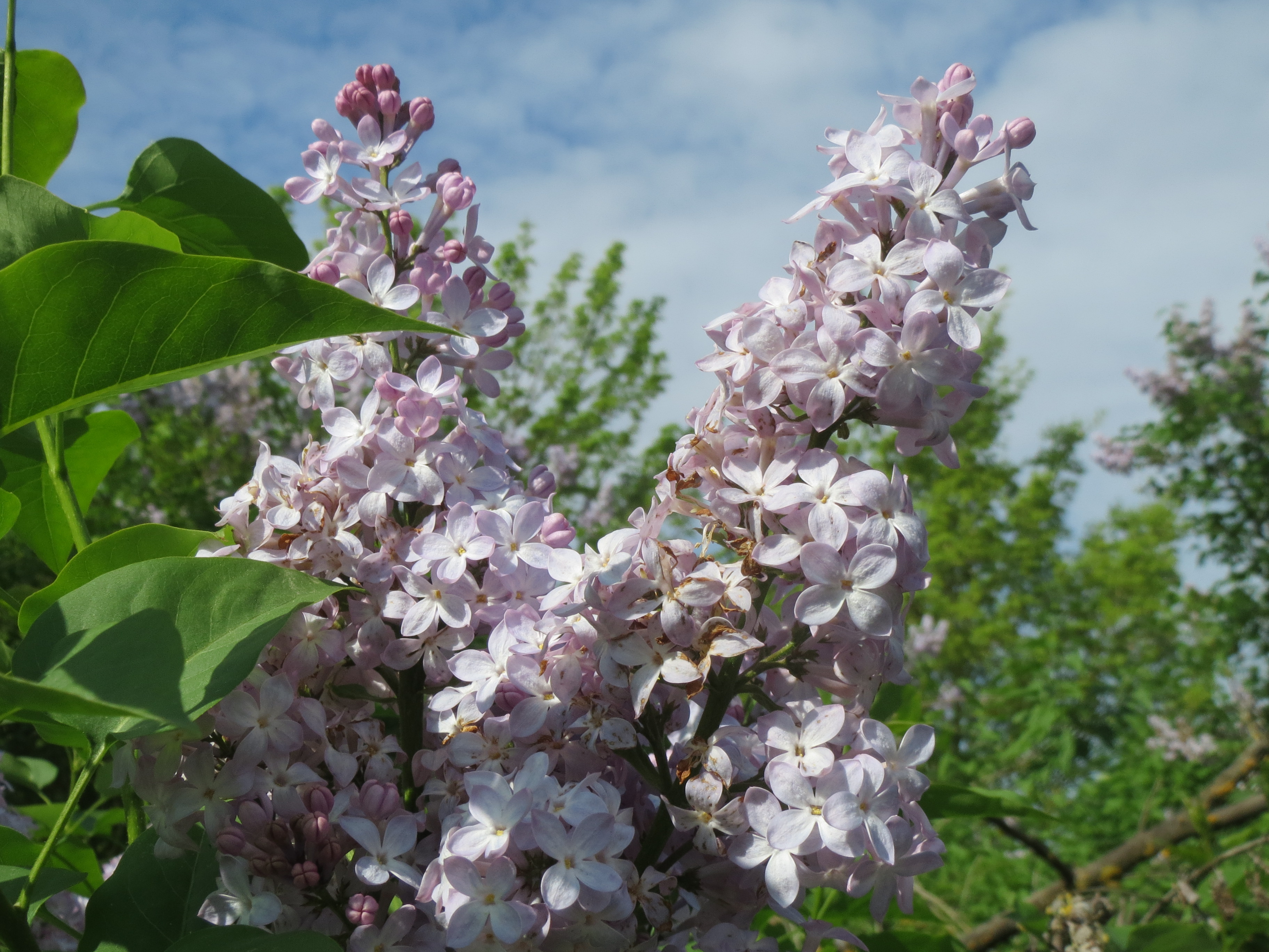 Gemeiner Flieder (Syringa vulgaris) bei Hockenheim